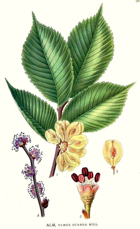 Ulmus glabra Huds., syn. Ulmus scabra Mill. Original Description Alm, Ulmus scabra Mill.